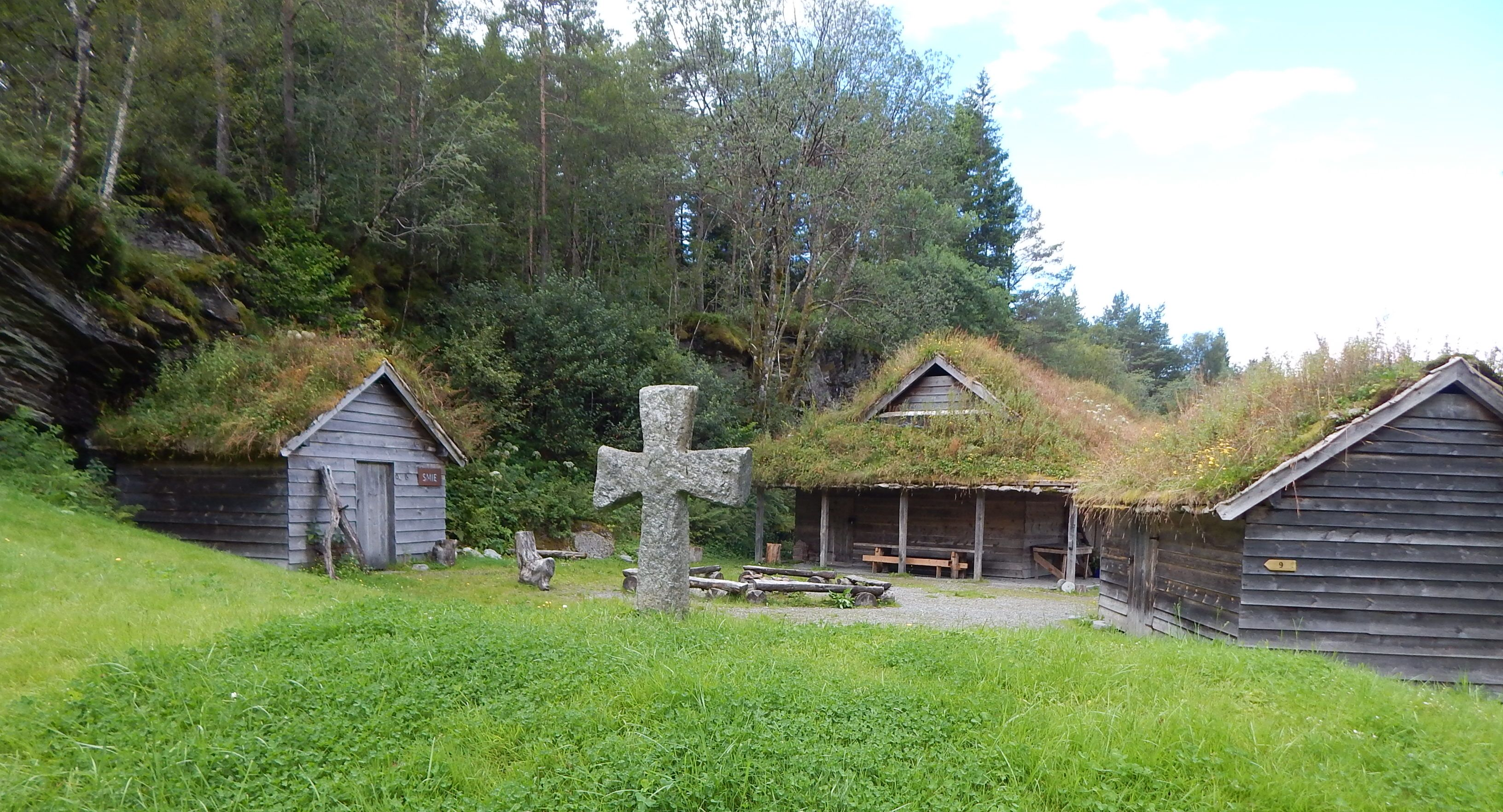 Kvernsteinsparken i Hyllestad